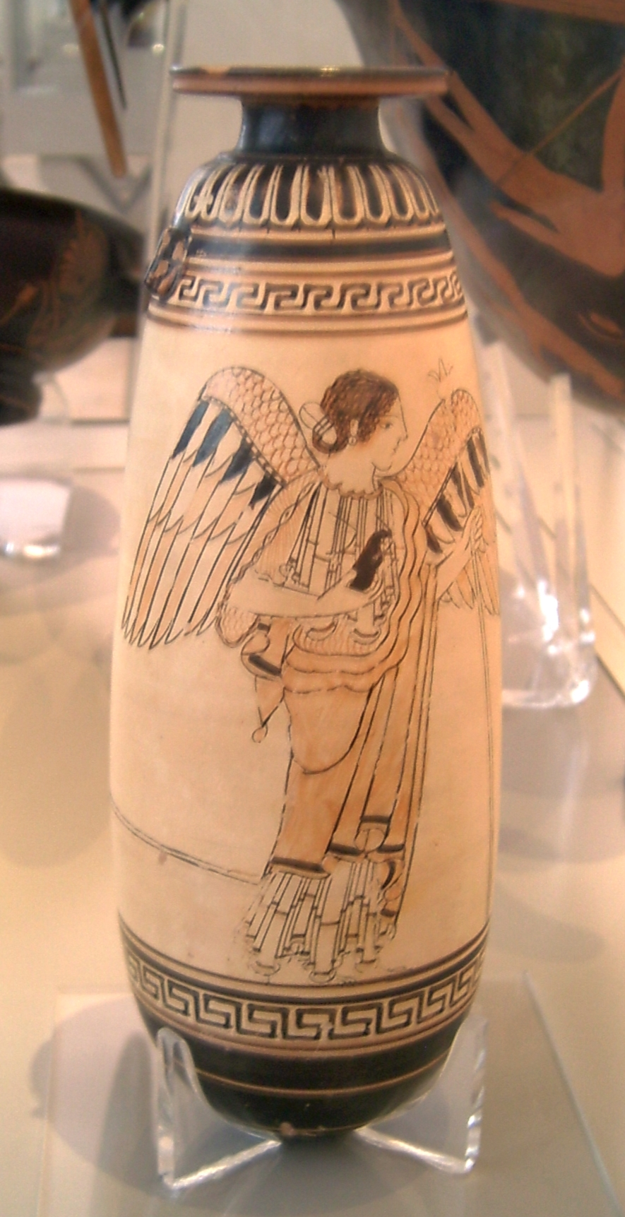 Nike und Athlet auf einem weißgrundigen Alabastron, aus dem Umkreis des Erzgießerei-Malers, um 480 v. Chr., gefunden in Tanagra. Antikensammlung Berlin (Altes Museum), Inventarnummer F 2258.